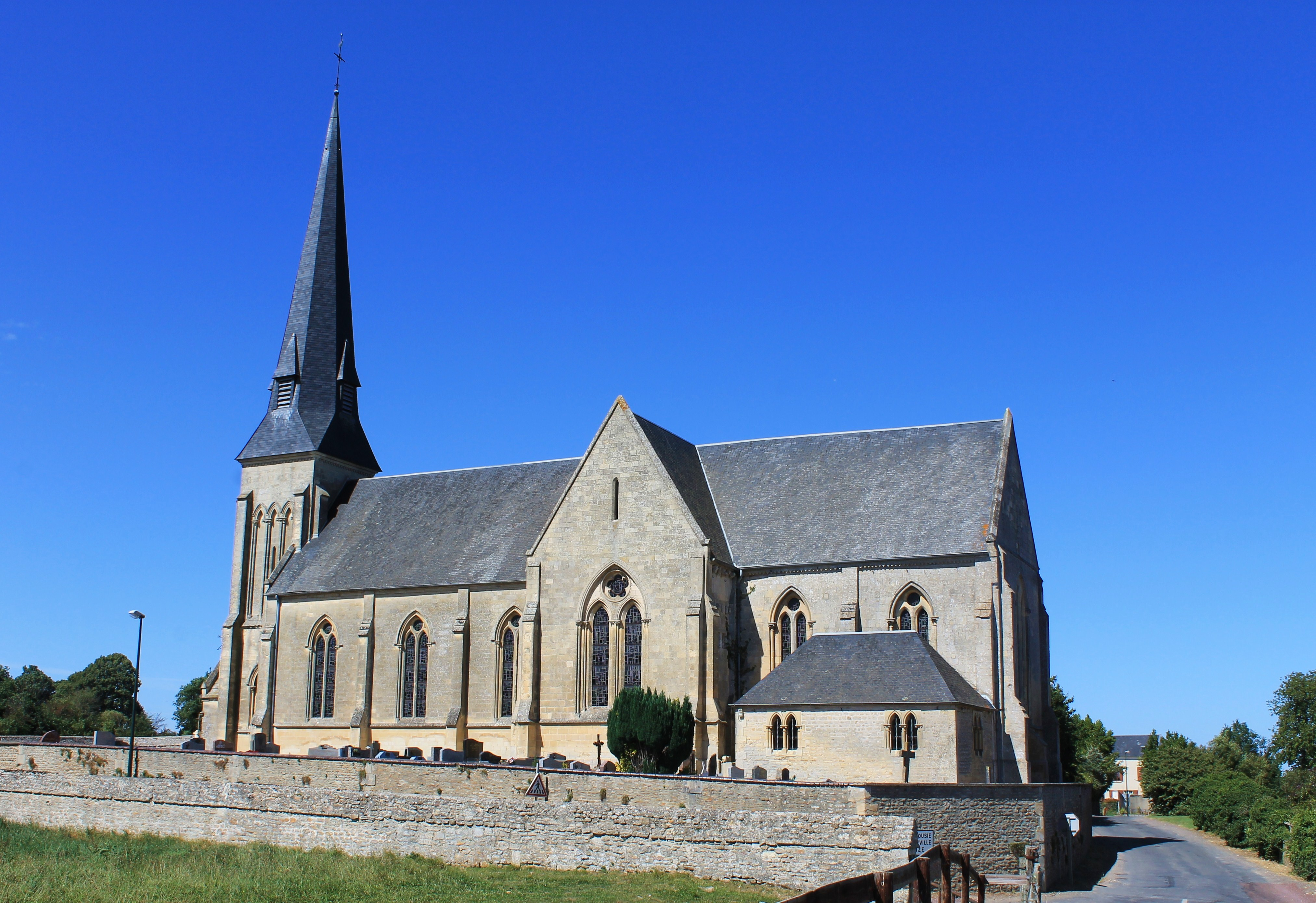 église à Saint-Aignan-de-Cramesnil (Calvados)